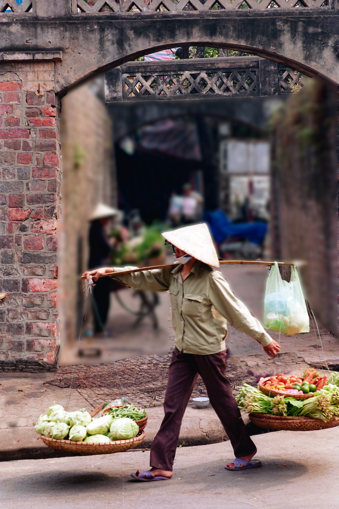 Vietnam 2003